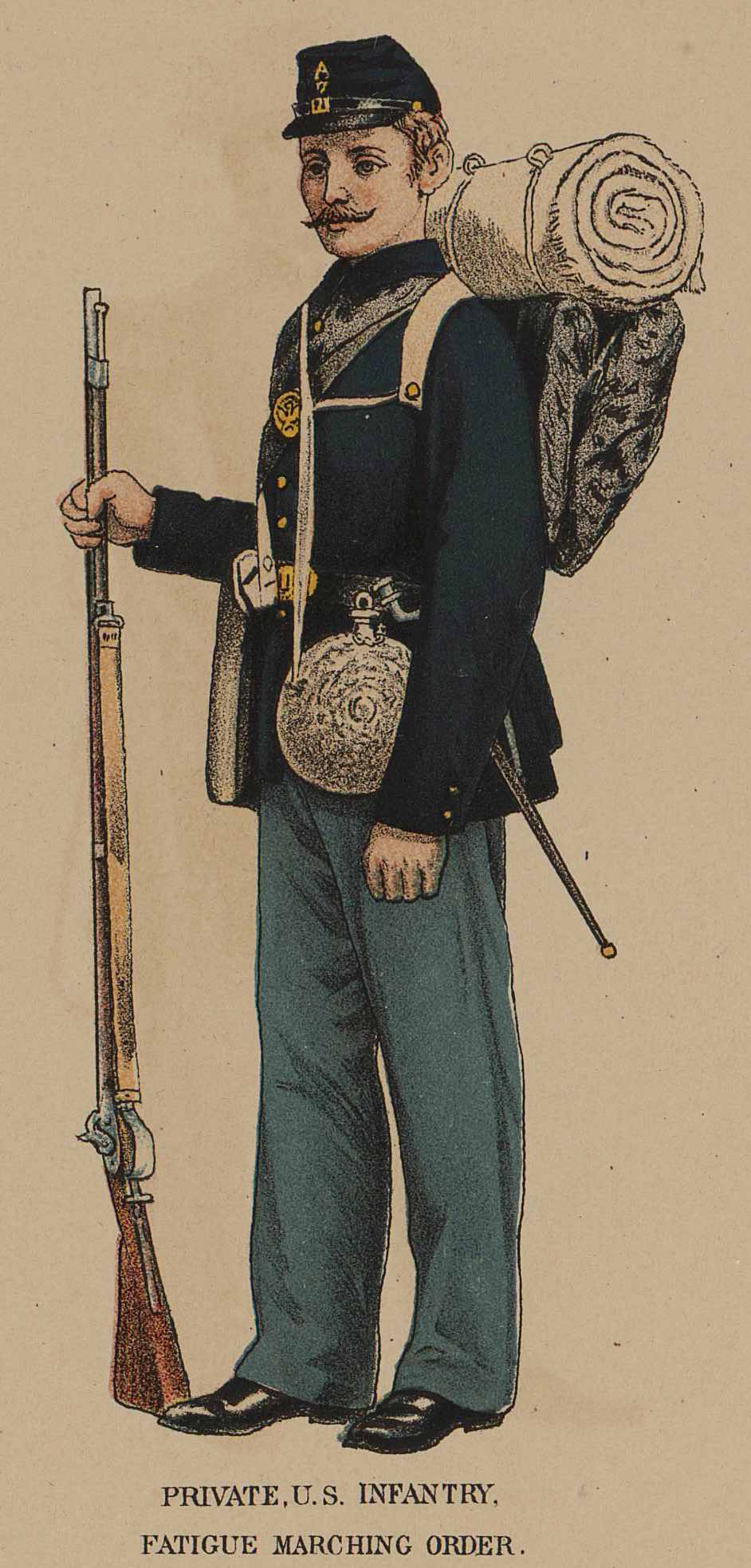 Union private infantry uniform, from plate 172 of the "Atlas to Accompany the Official Records of the Union and Confederate Armies," containing illustrations of uniforms worn by Union and Confederate soldiers during the American Civil War